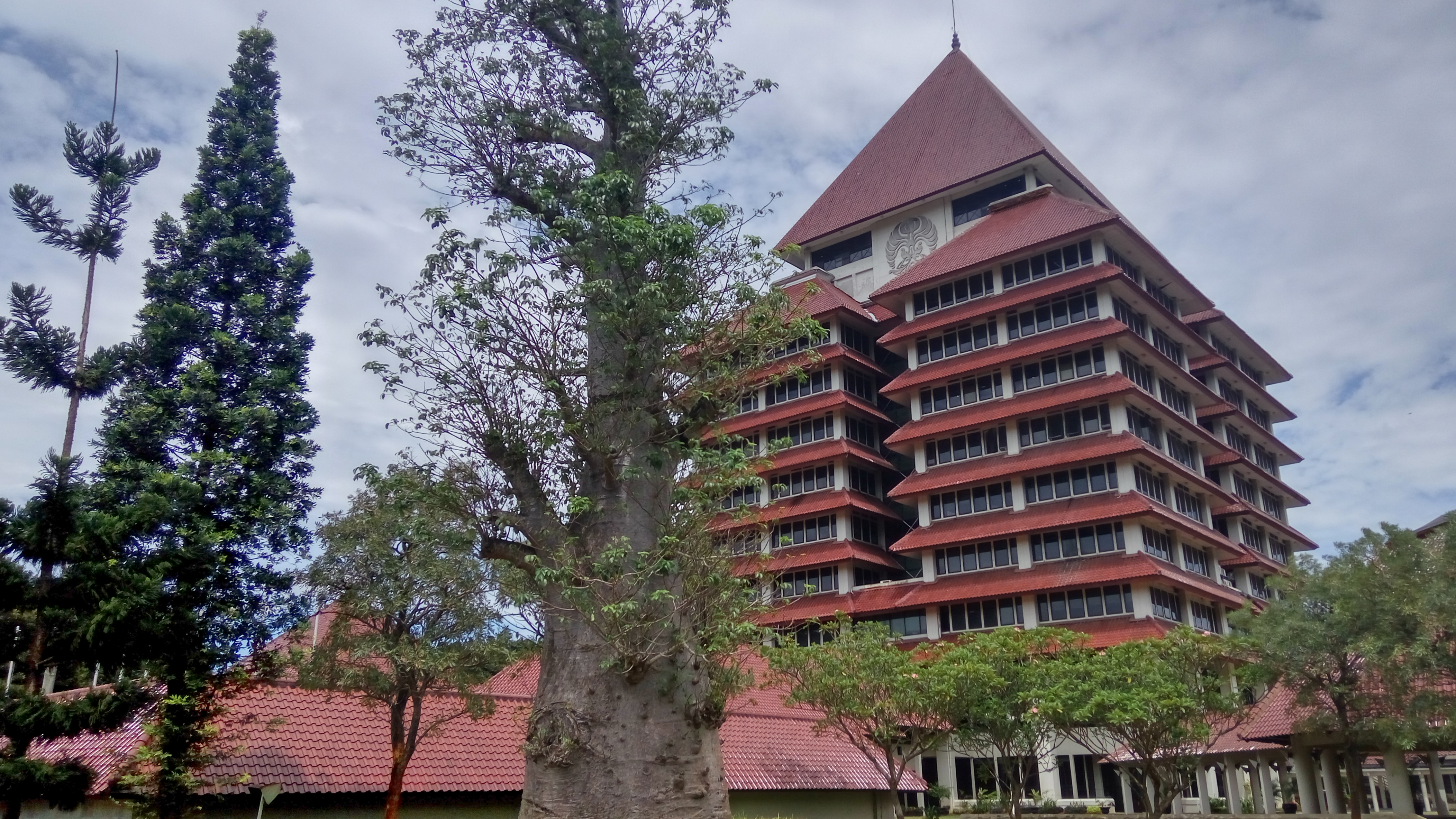 Bangunan di Kampus UI Depok